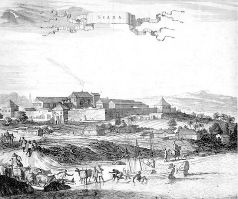 Gravura de Arnoldus Montanus retratando o forte na barra do rio Ceará, região da atual cidade de Fortaleza, capital do estado do Ceará, no Brasil.